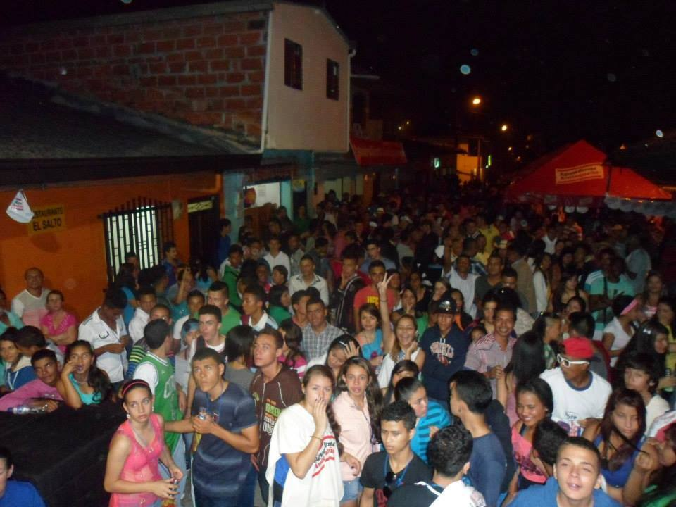 La comunidad Salteña orgulosa de celebrar sus queridas Fiestas del Agua.